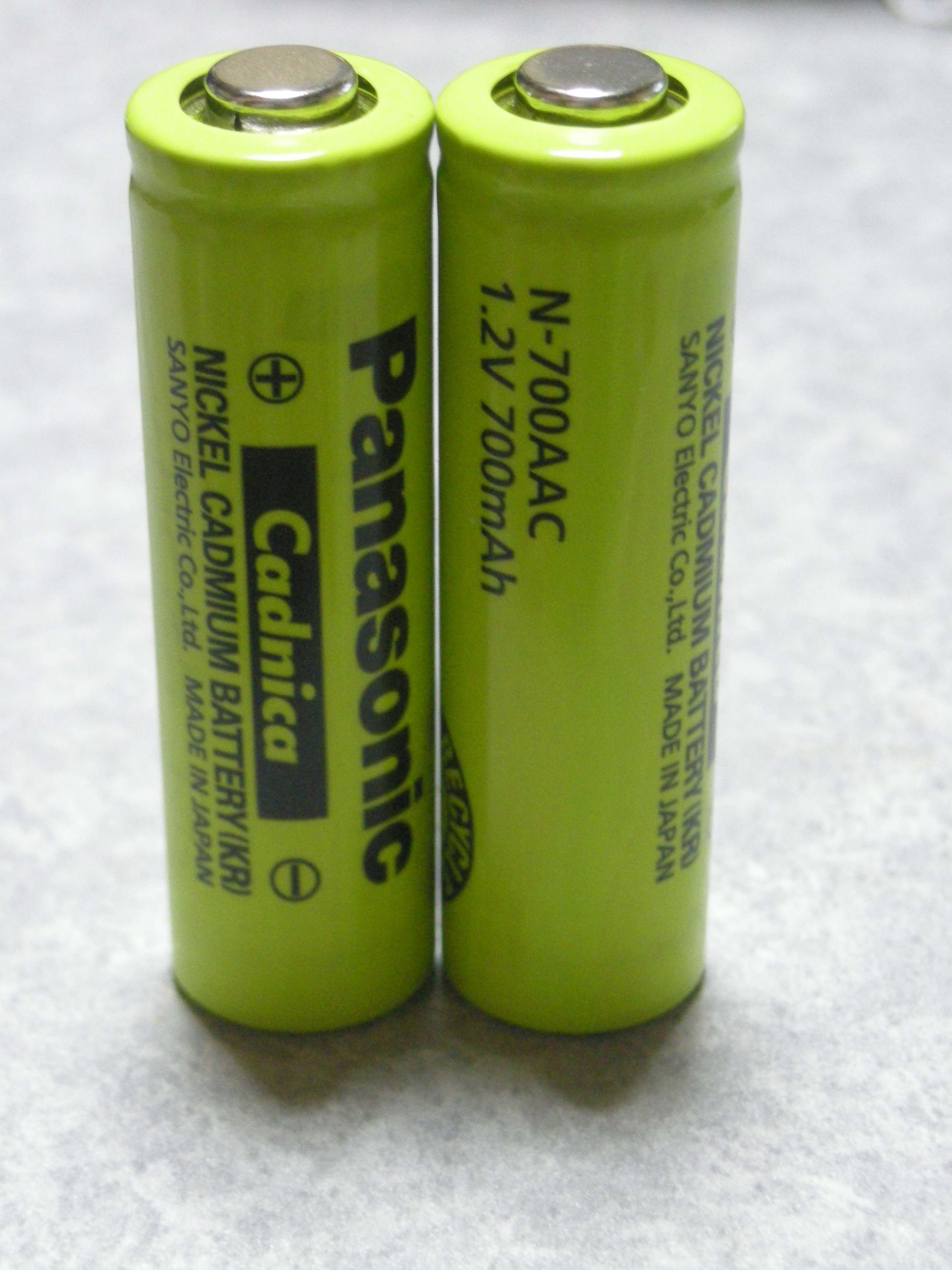 三洋電機がパナソニックの子会社になった後のカドニカ電池。 社名表記は三洋なのに、ブランドはPanasonicになっている。